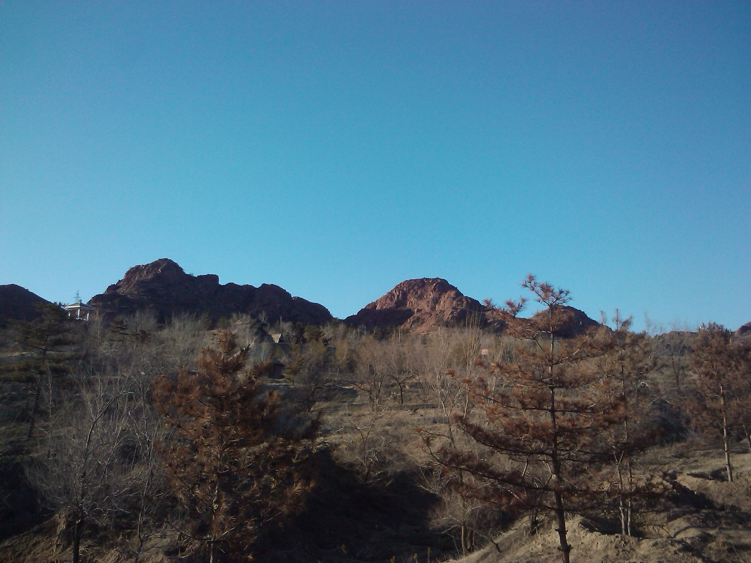 红山